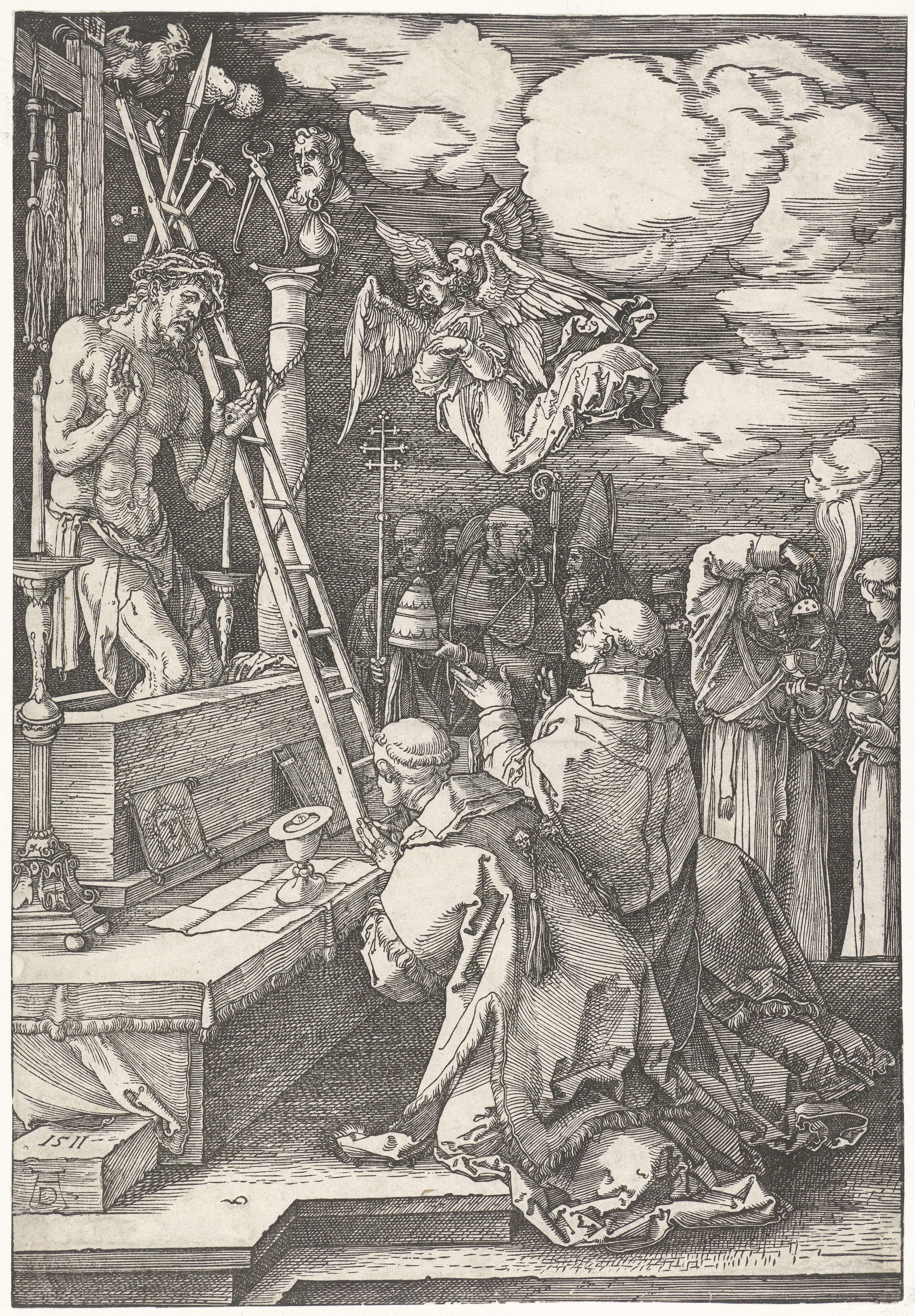 Gregoriusmis, by Albrecht Dürer.